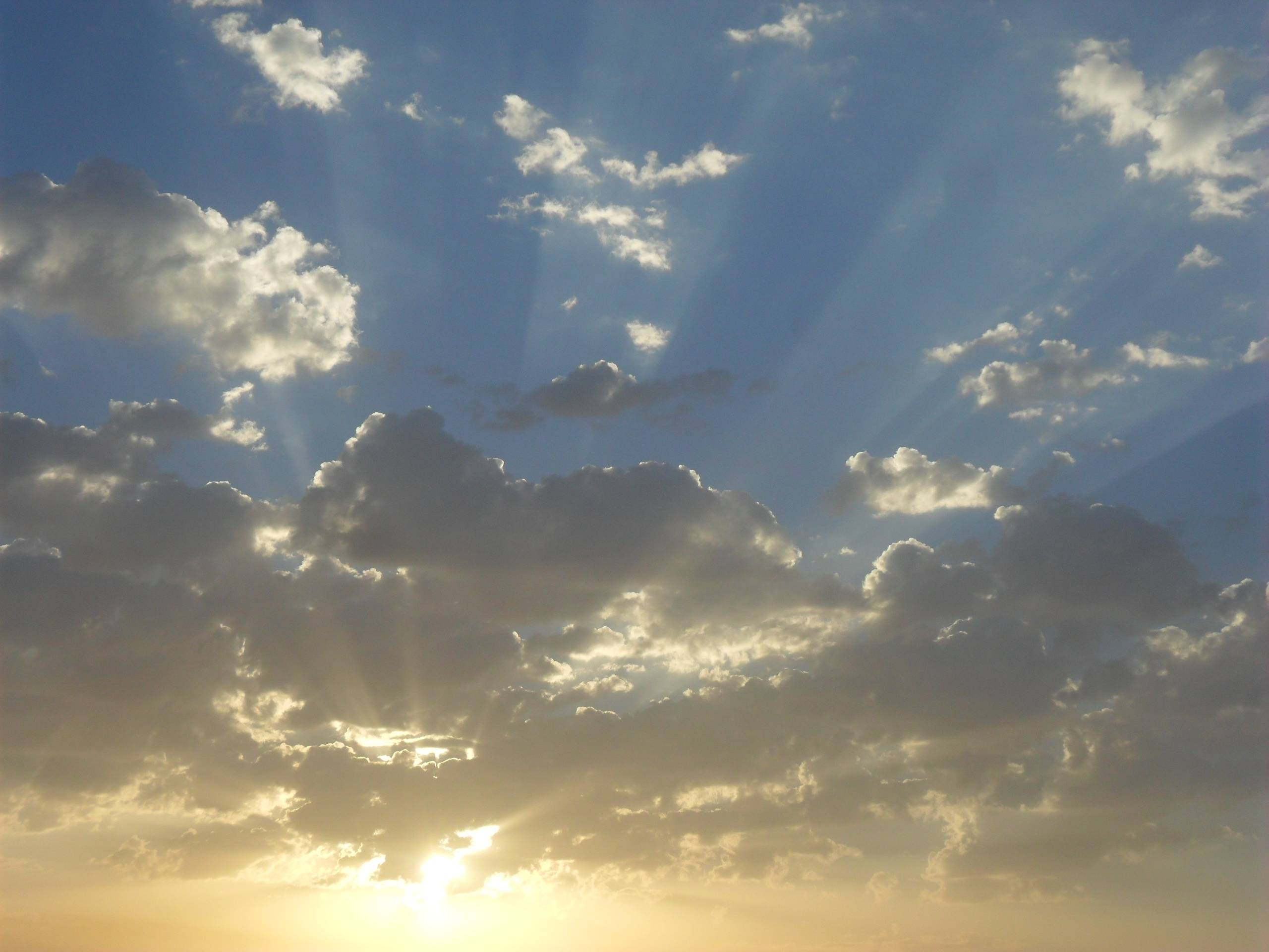 سحب الرياض في فترة العصر